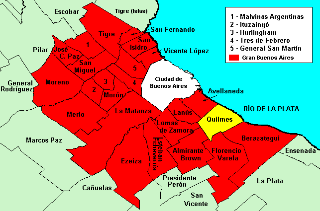 Ubicacion del Partido de Quilmes en el Gran Buenos Aires